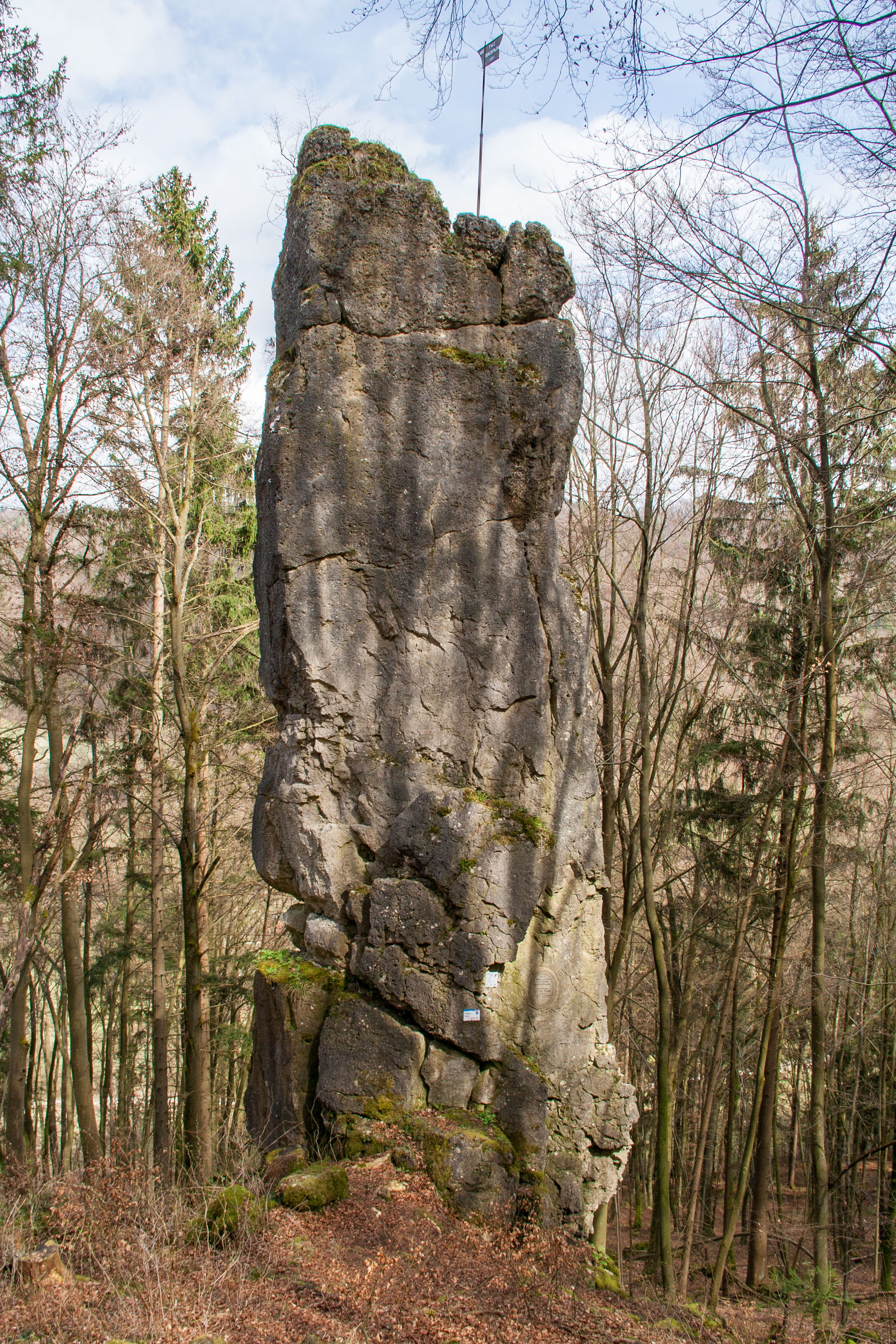 Trubachtal, Landkreis Forchheim, Geotop, Hohen Kirchfelsen bei Dörnhof, LSG Fränkische Schweiz - Veldensteiner Forst im Regierungsbezirk Oberfranken